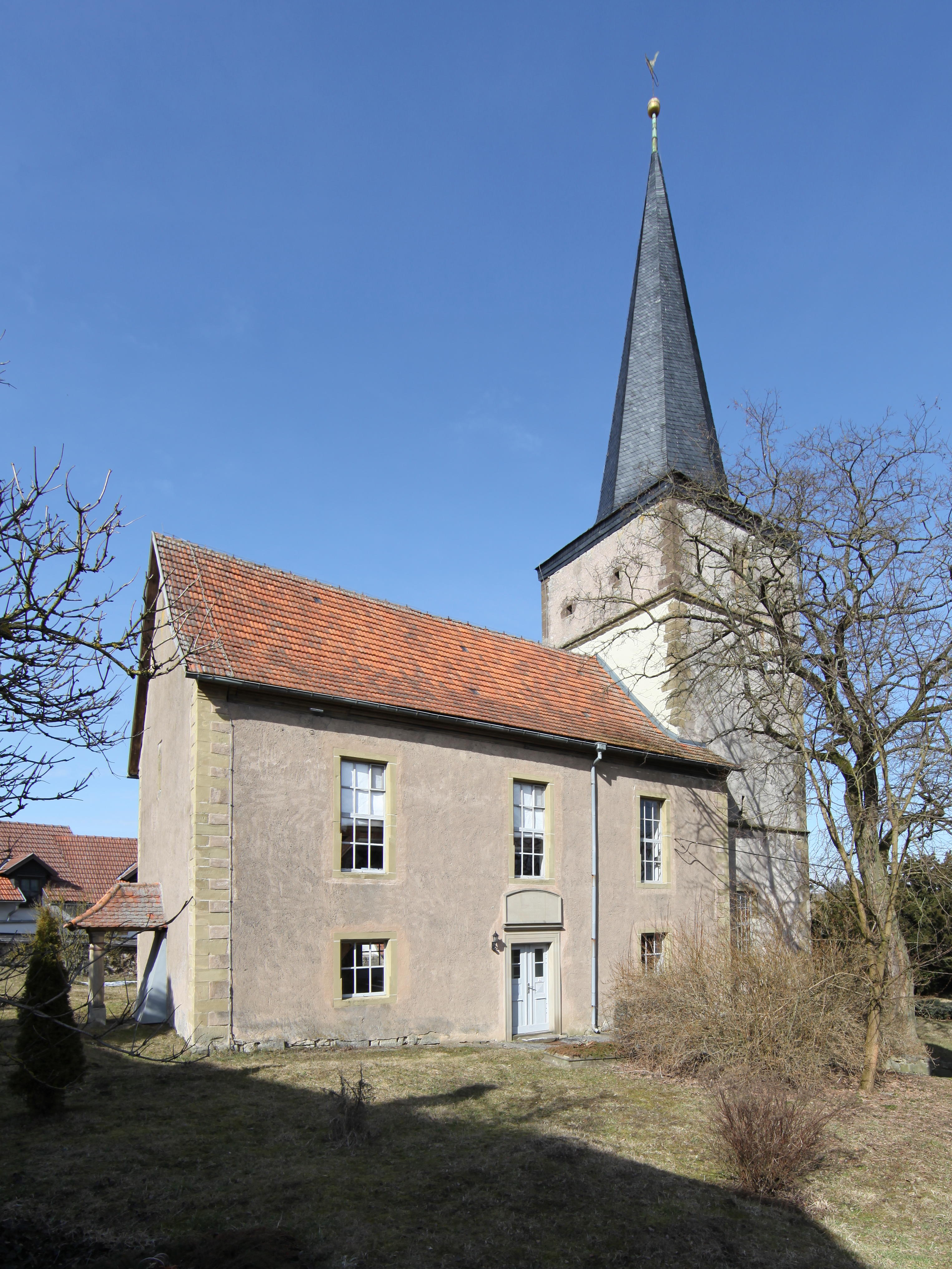 Evangelisch-Lutherische Kirche St. Oswald in Zeilfeld bei Gleichamberg, OT von Römhild, Landkreis Hildburghausen